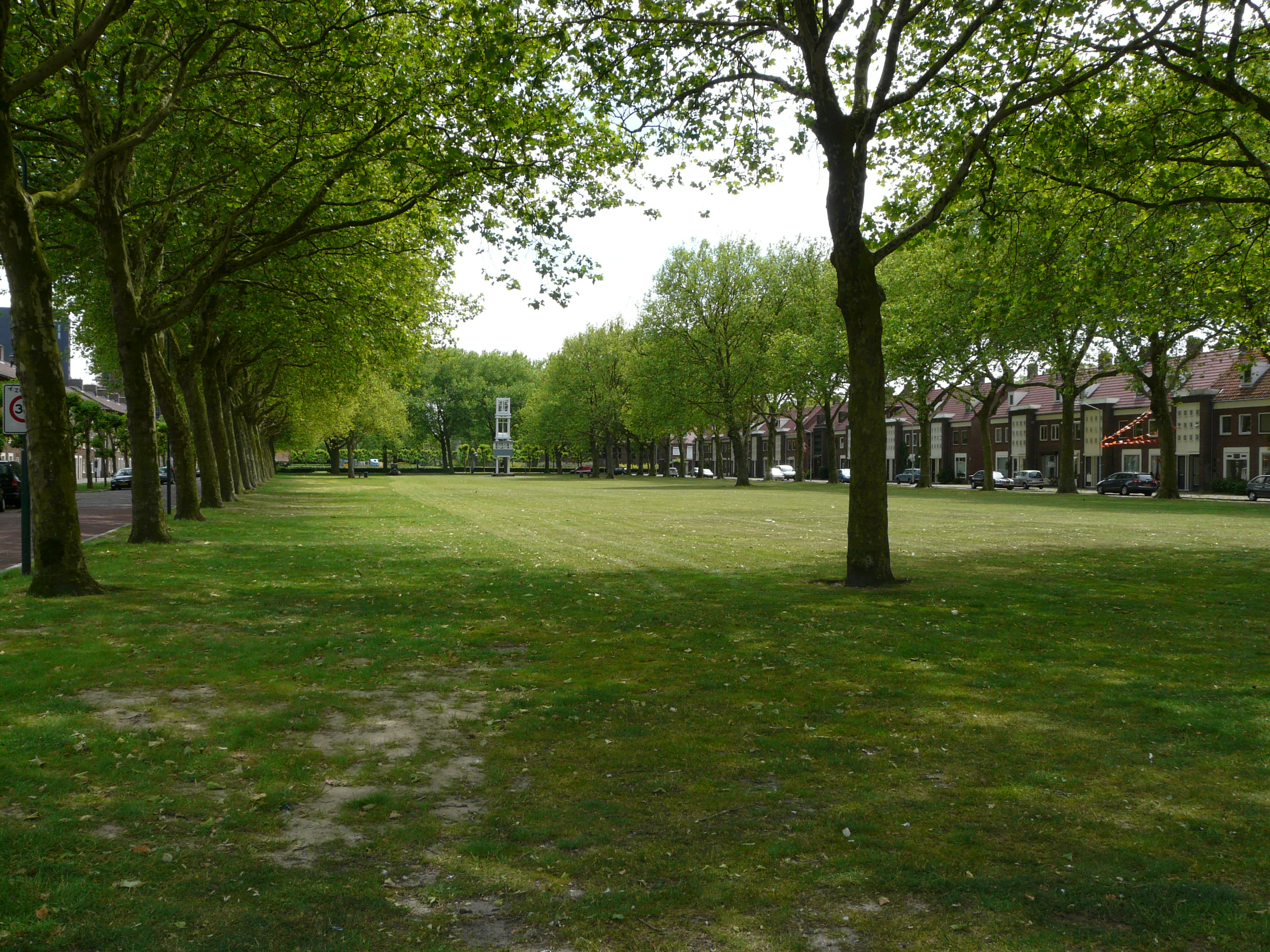 Zicht op een deel van de Heuvelbrink en deel van de straat de Heuvelbrink, Breda gelegen in de wijk de Heuvel in Breda